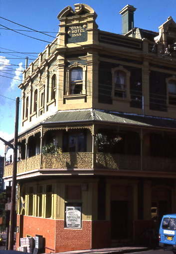 hotel, sydney